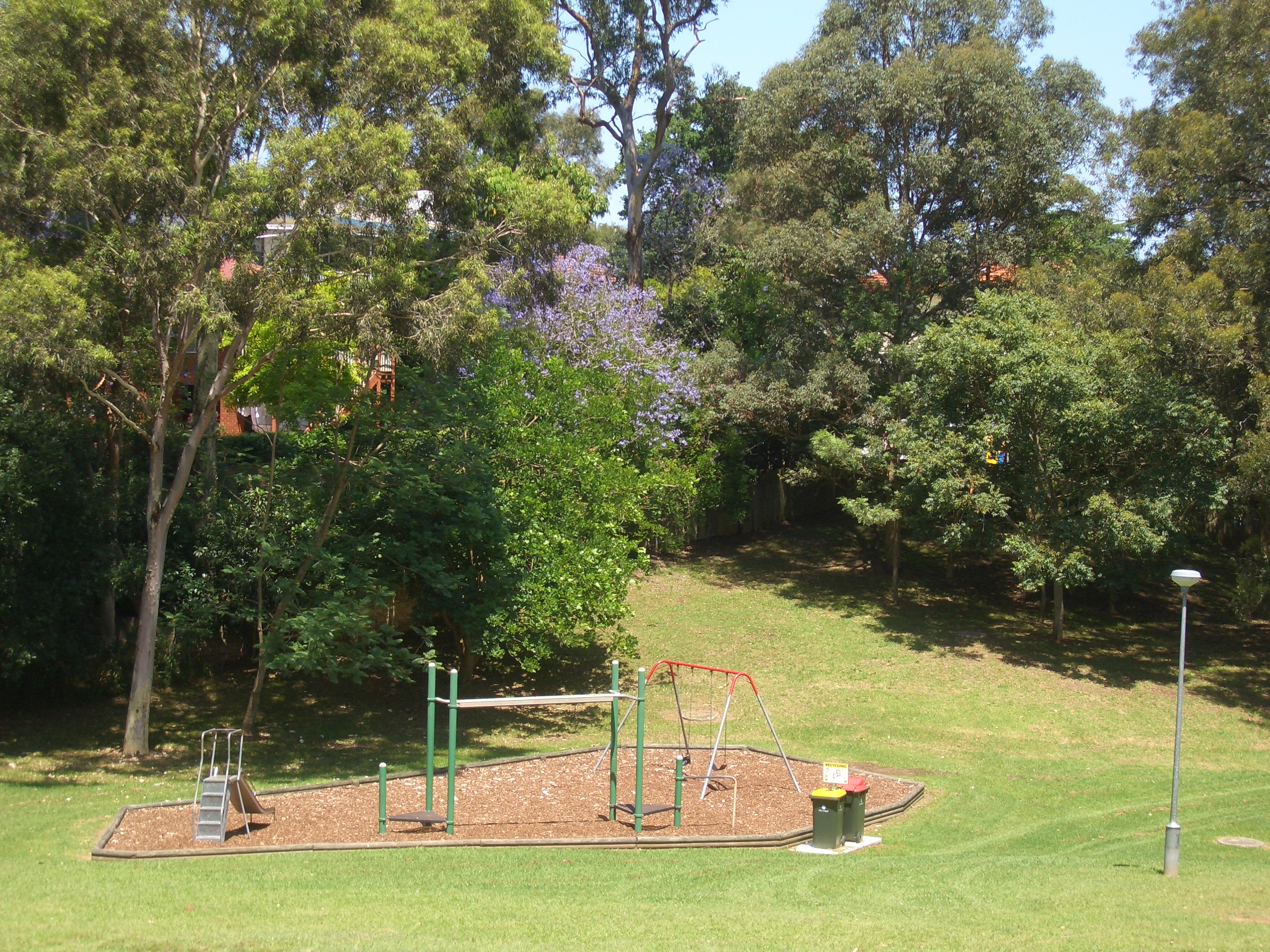 West Denistone Park, Denistone West, Sydney